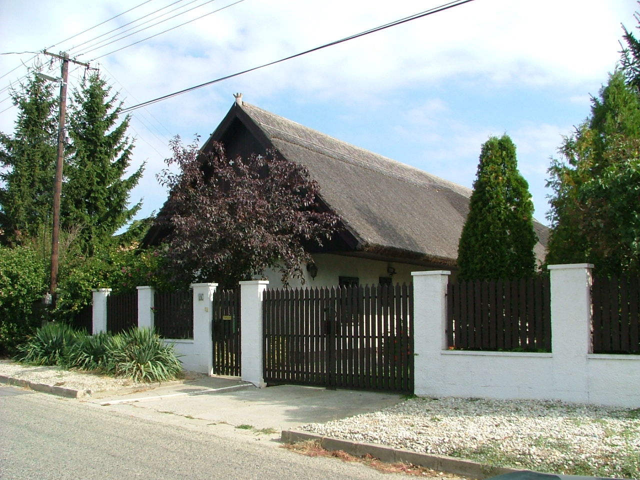 Takaros ház portája (Győrújbarát??)